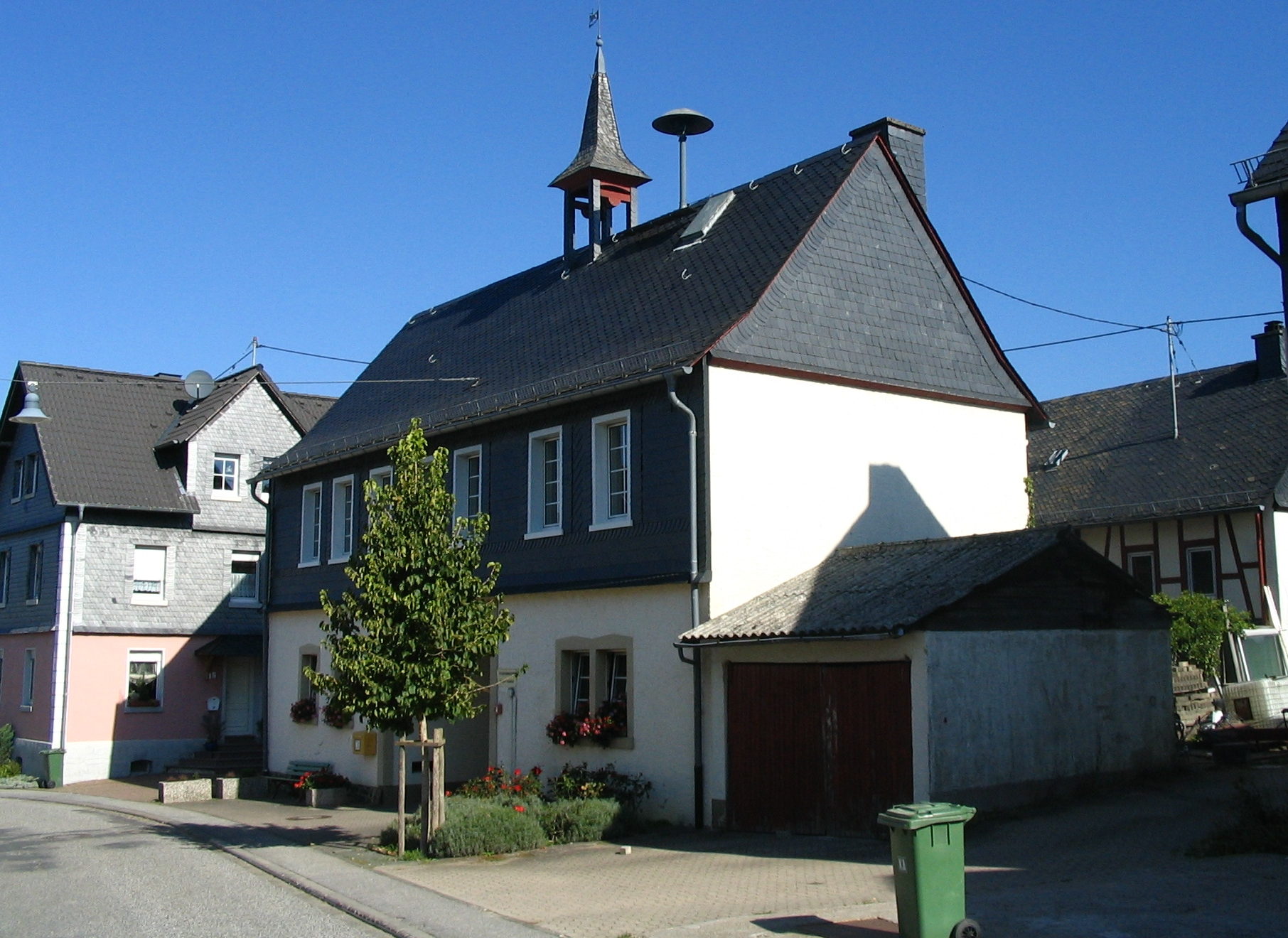 Gemeindehaus in Hollnich (Hunsrück)